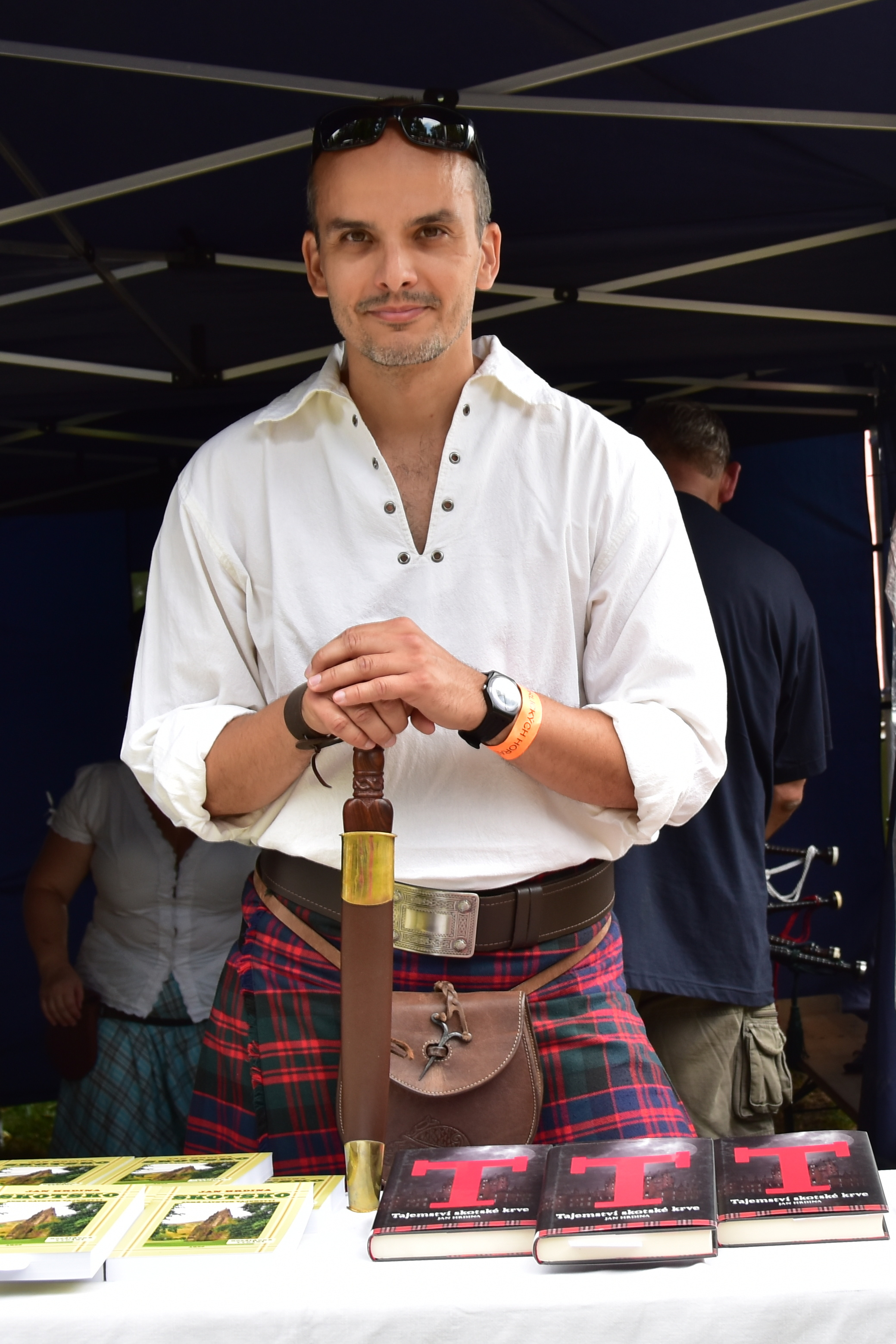 Jan Hrdina na 9. Horalských hrách v Rokytnici v O.h.